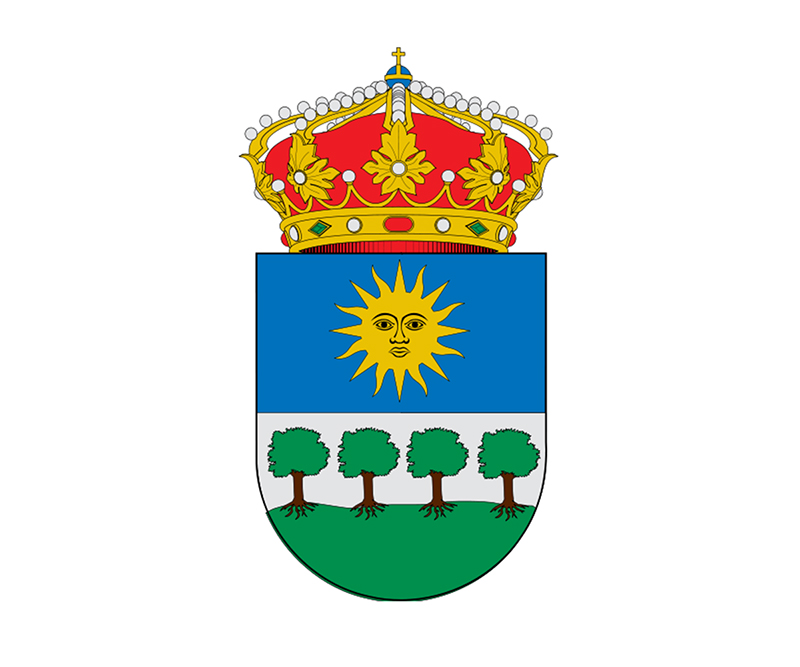 Bandera de Minaya. Usada en ocasiones, aunque no esta aprobada en ningún órgano municipal.